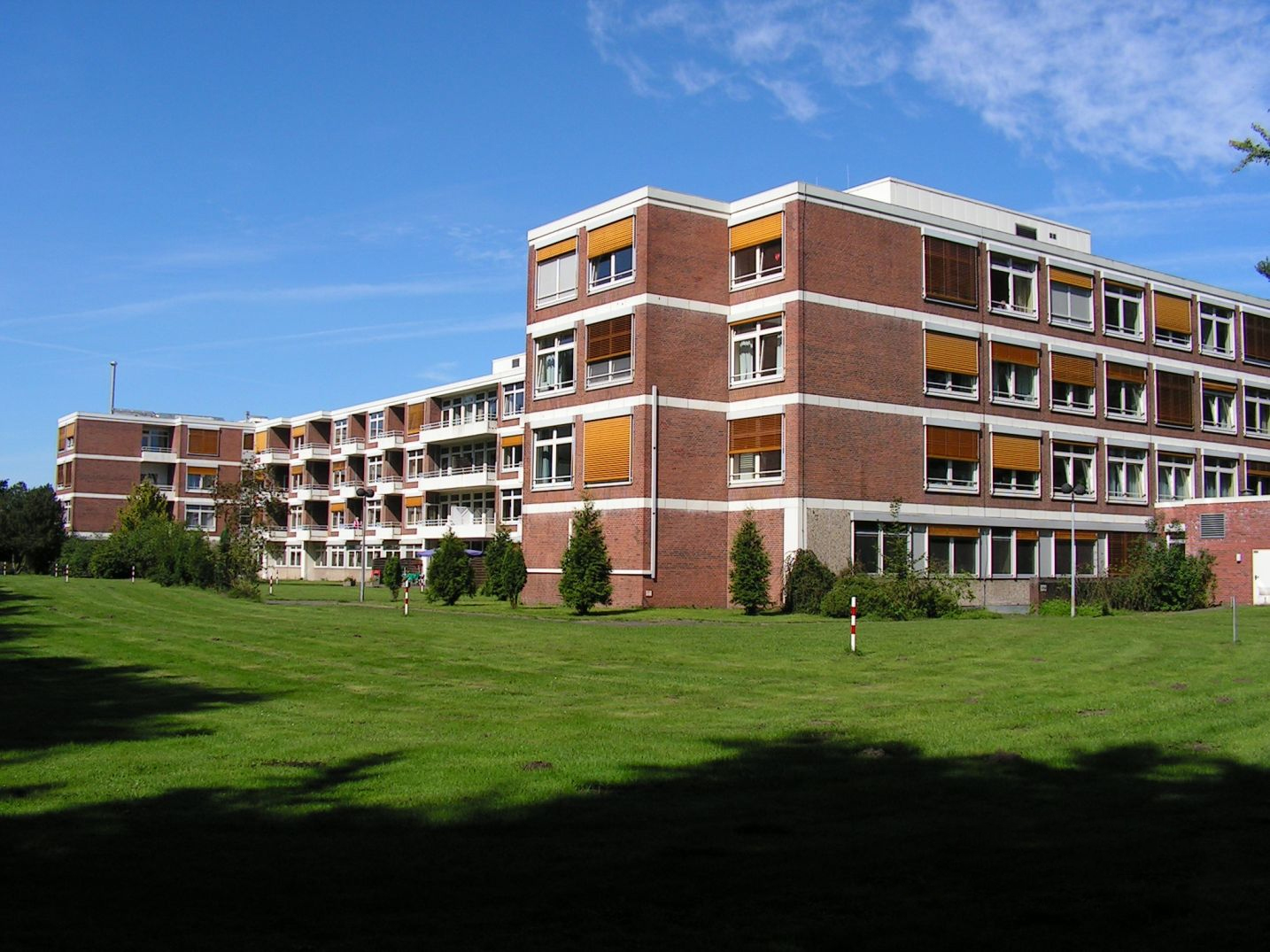 Forschungszentrum Borstel / Klinik